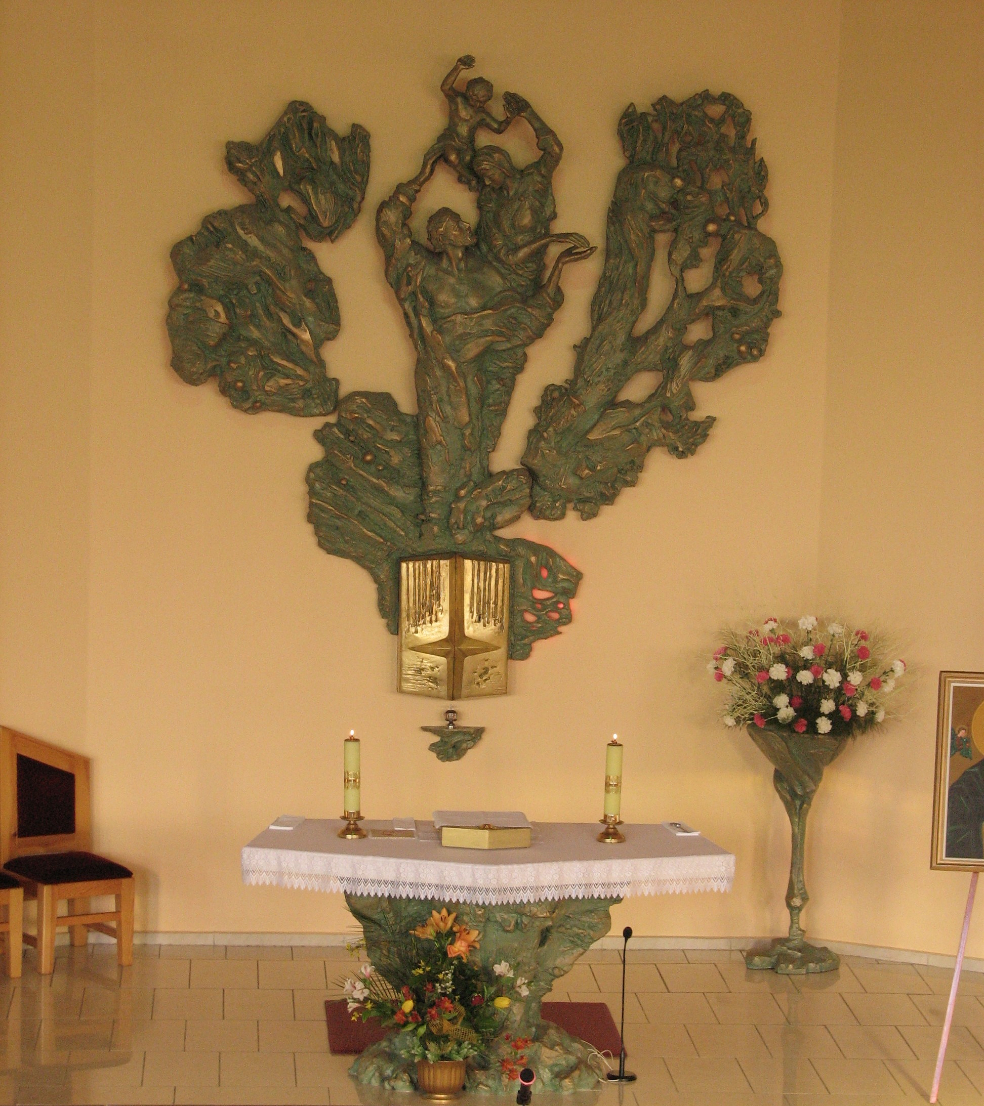 Ołtarz w parafii św. Rodziny w Tychach - zdjęcie z chóru